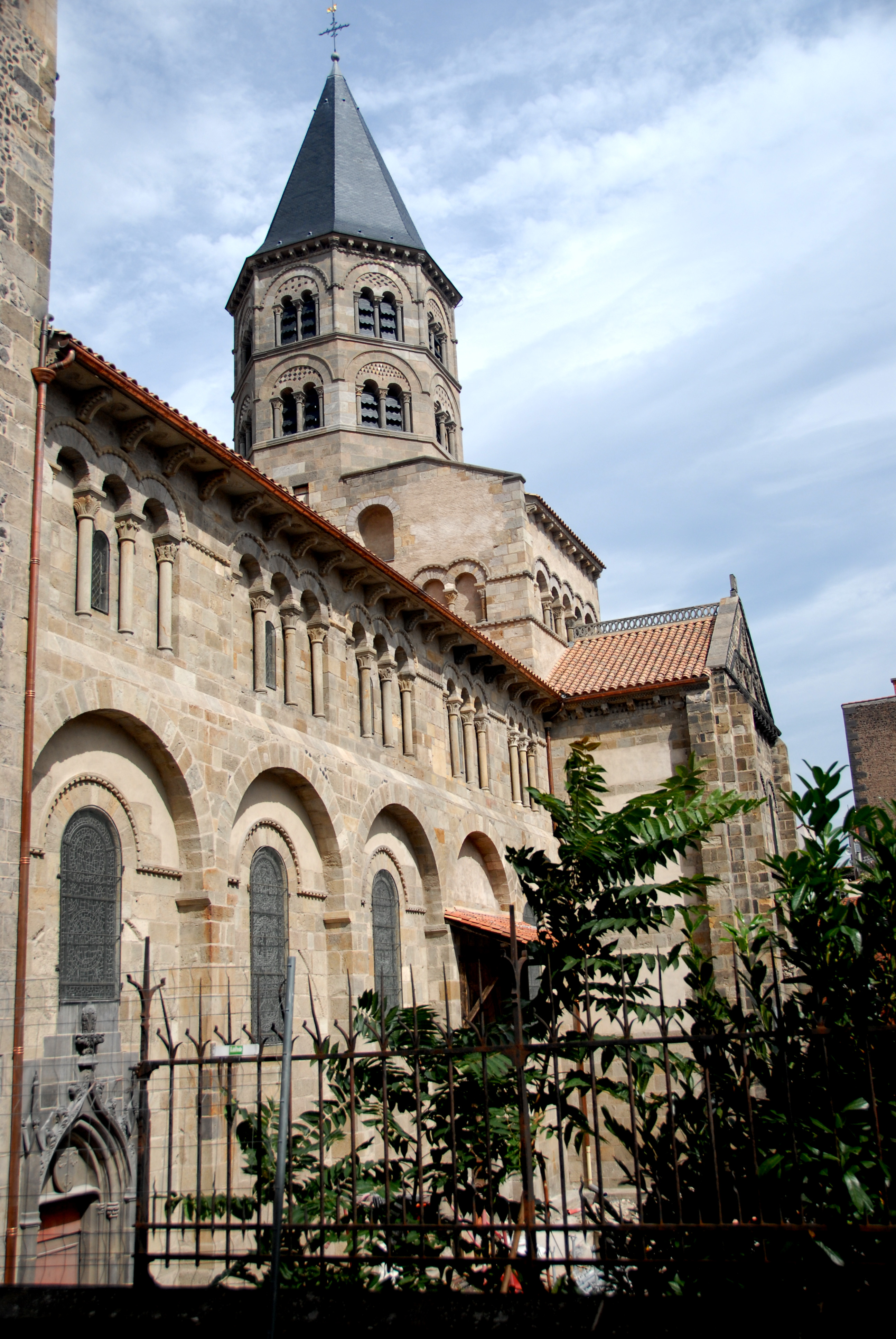 Notre-Dame du Port, Langhaus von SW